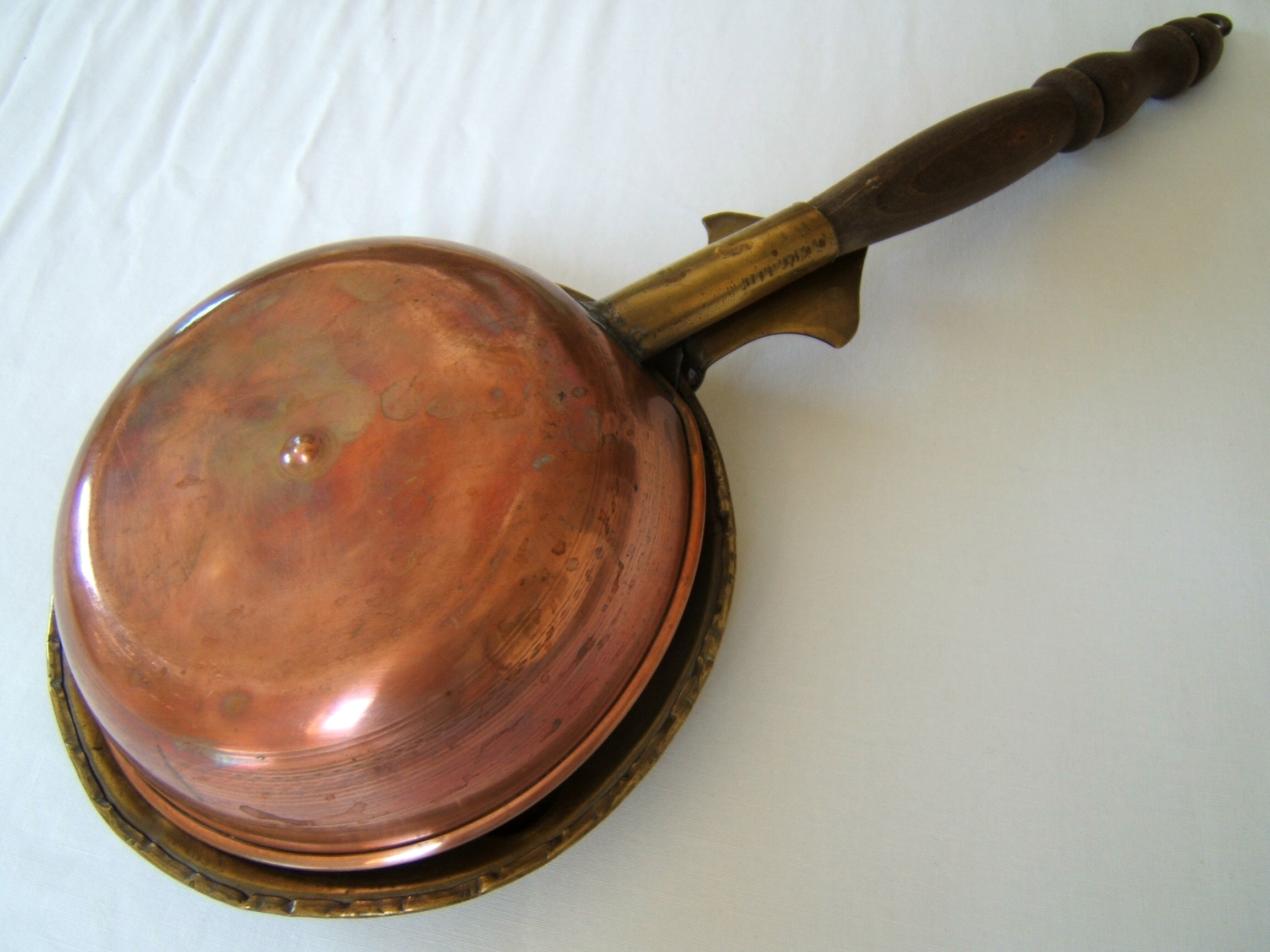 Beddenpan, rood koperen onderzijde